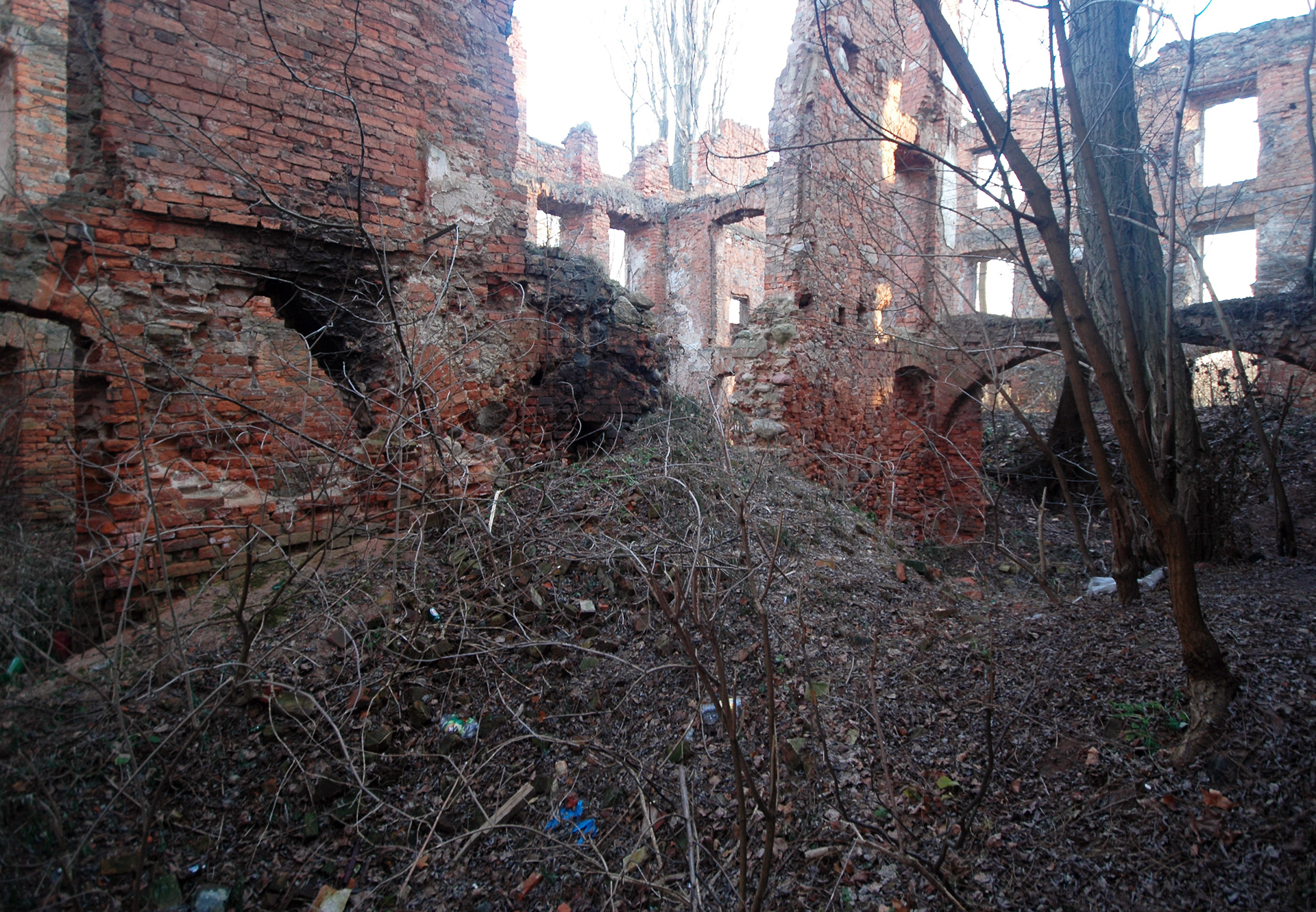 Krzydłowice - pałac (ruina) z parkiem (zabytek nr rejestr. A/2967/173/323/L z dn. 15.03.61)